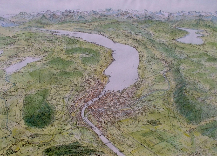 Zürichsee Plan der Stadt Zürich mit Zürcher Oberland aus der Vogelschau. Lithographie von J. J. Hofer 1885